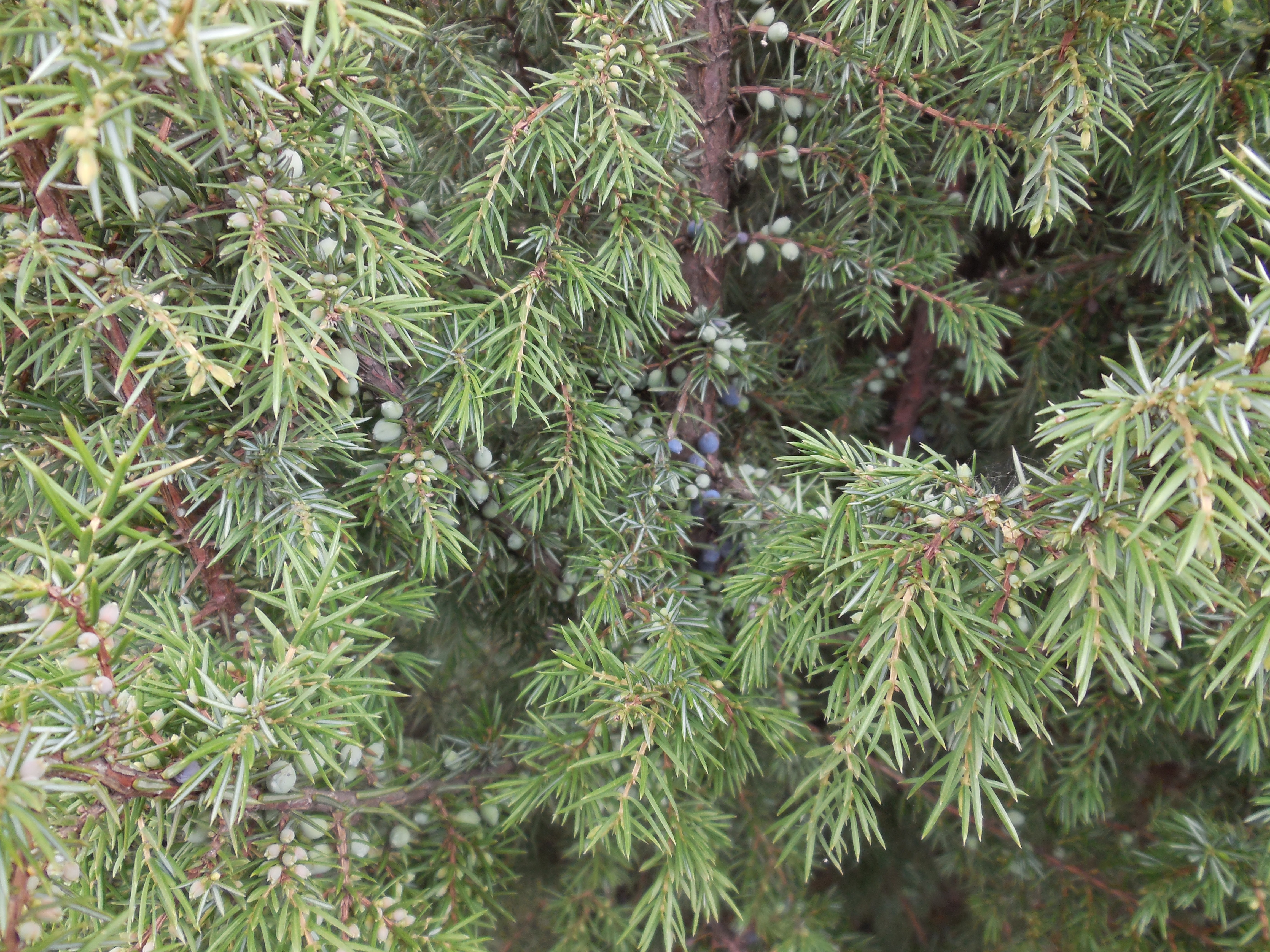 Болото Гумениха, Щёлковский район This image is related to the protected area of Russia number 5010328